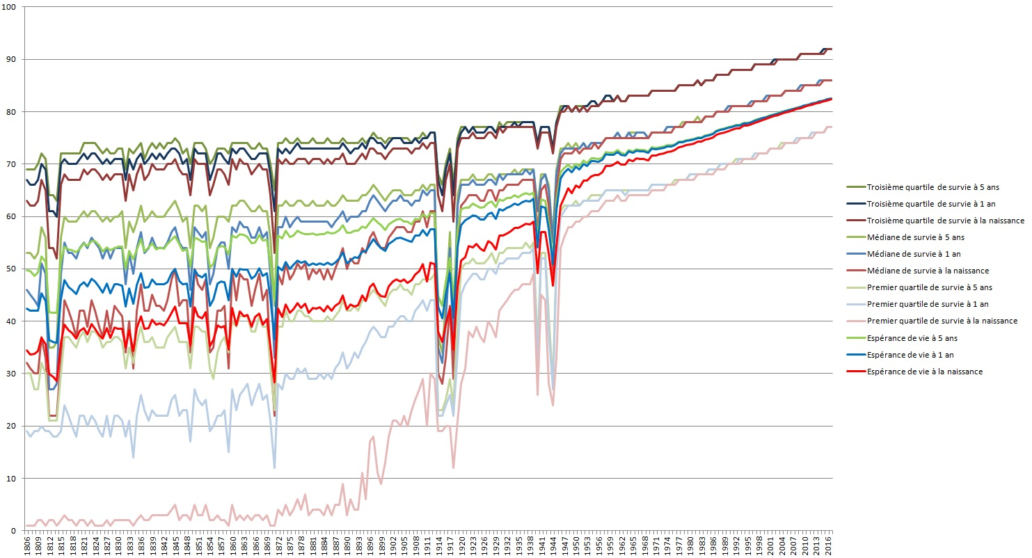 Évolution de l'espérance de vie et des quartiles de survie en France de 1806 à 2017 (Source: INED) Définitions: - Espérance de vie à la naissance: âge moyen de décès. - Premier quartile de survie: âge à partir duquel 25% de la population est morte. - Médiane de survie: âge à partir duquel 50% de la population est morte. - Troisième quartile de survie: âge à partir duquel 75% de la population est morte. - à la naissance: pour toute la population. - à 1 an: pour la population ayant survécu à leur 1er anniversaire. - à 5 ans: pour la population ayant survécu à leur 5ème anniversaire.